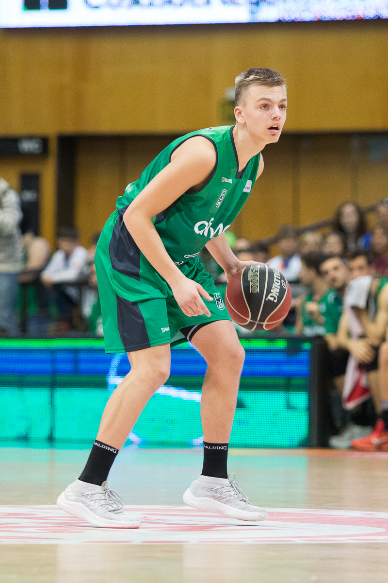 Arturs Zagars amb la samarreta del primer equip del Joventut de Badalona en la temporada 2017-18.